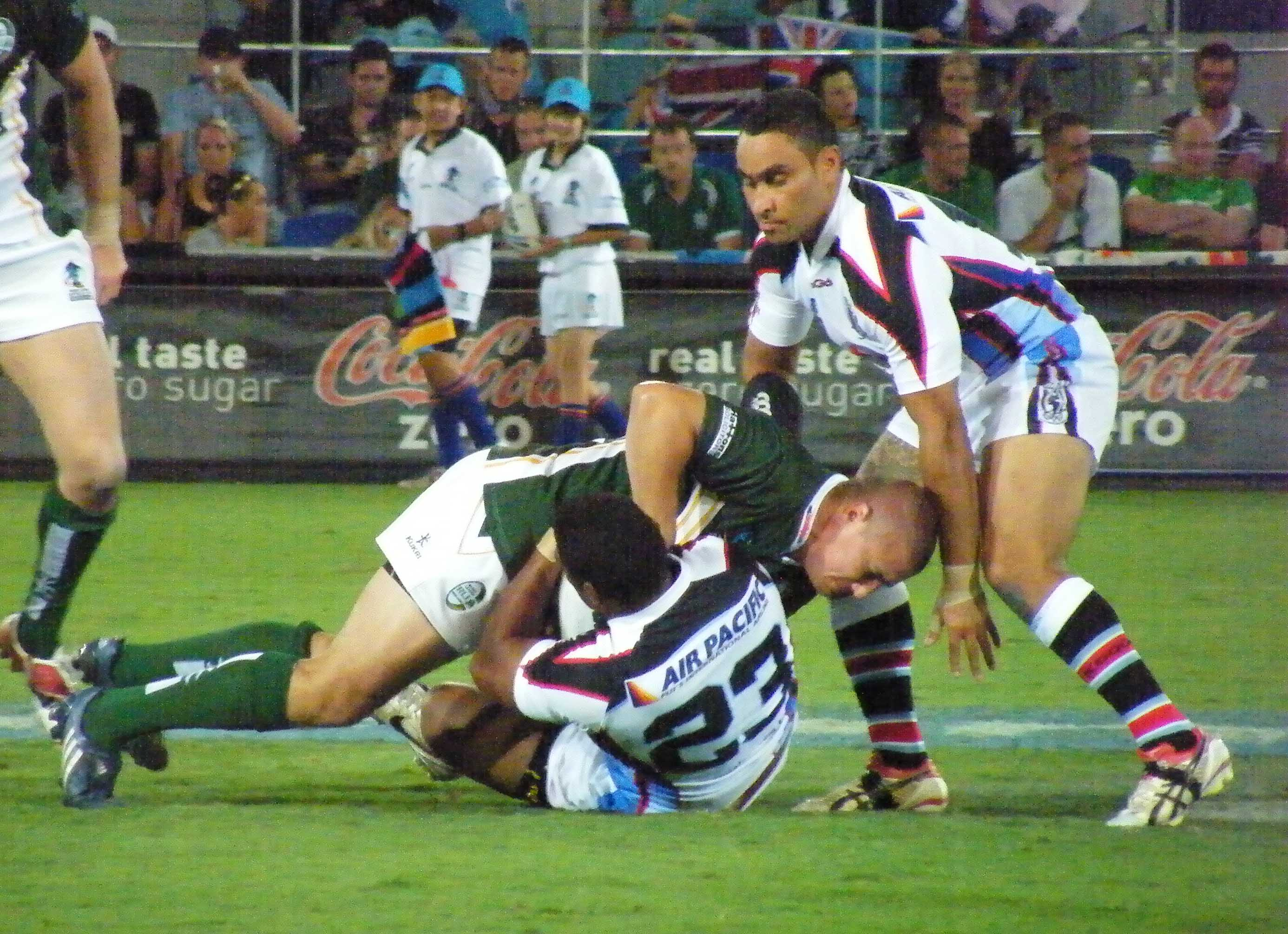 RLWC - Fiji v Ireland, Gold Coast 2008. Fijian Hooker James Storer.